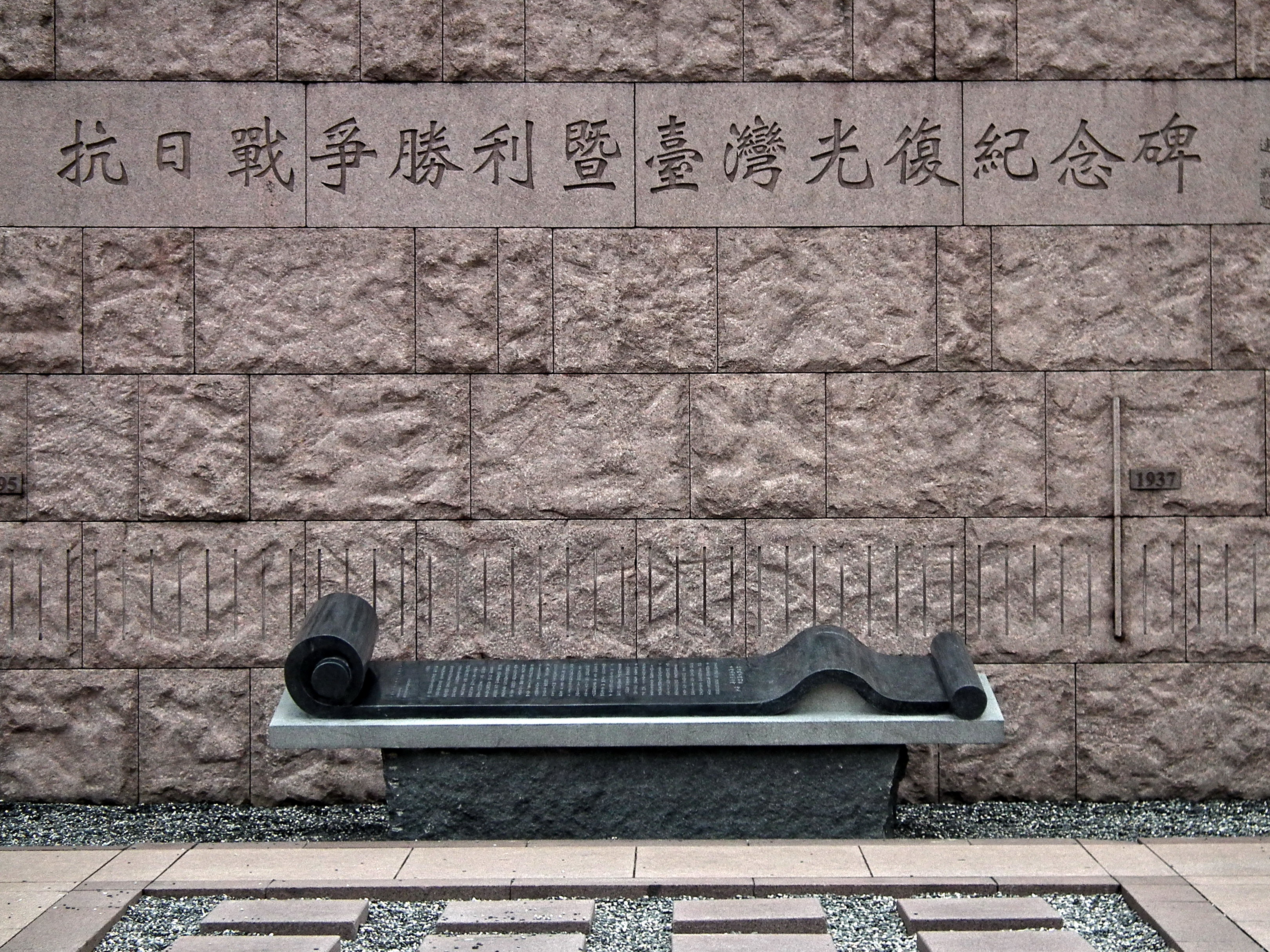 抗日戰爭勝利暨臺灣光復紀念碑正面。